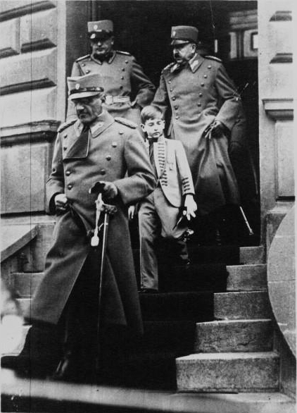 Alejandro I de Yugoslavia y su hijo Pedro en 1932.